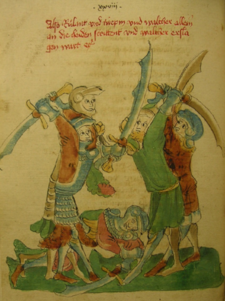 Roland et Turpin à la fin de la bataille de Roncevaux dans "Karl der Grosse" du Stricker (vers 1440)